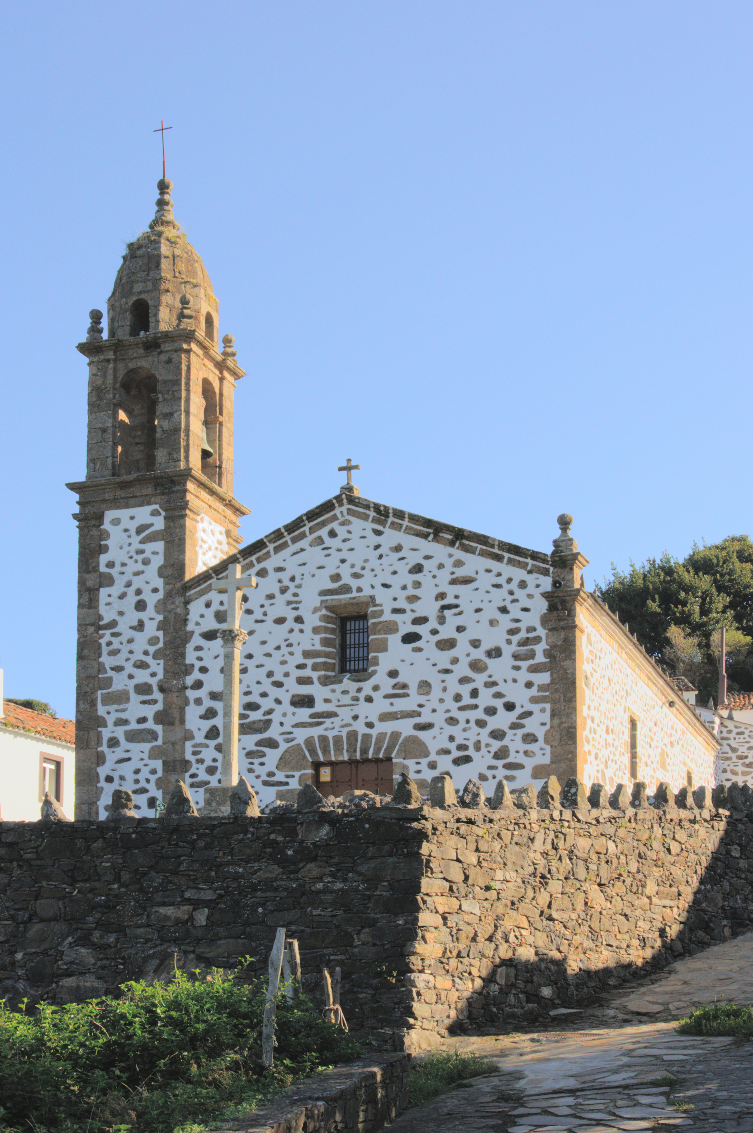 Wallfahrtskapelle San Andrés de Teixido